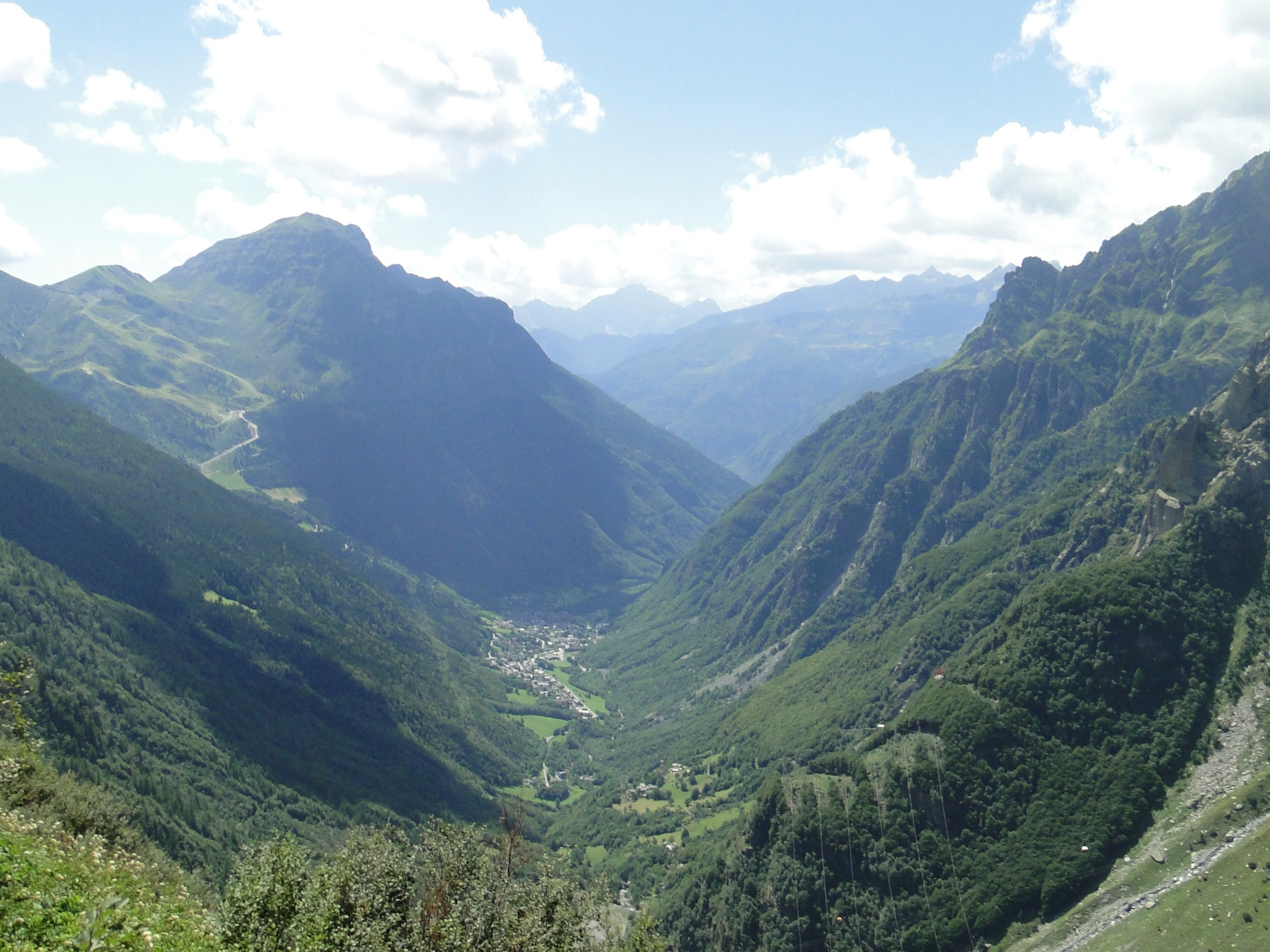 Vista su Valbondione, valle Seriana (BG), Italia